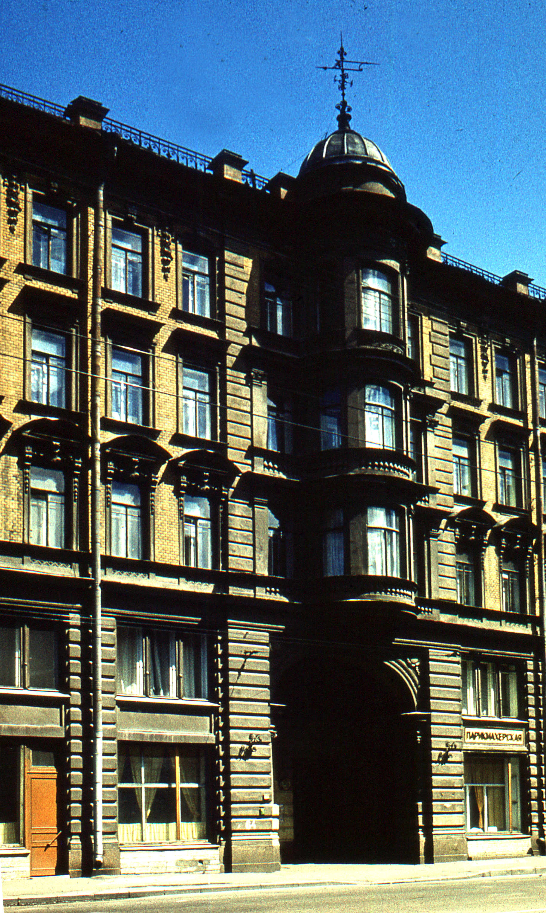 Петербург. Дом на Гороховой, 64, где жил Распутин